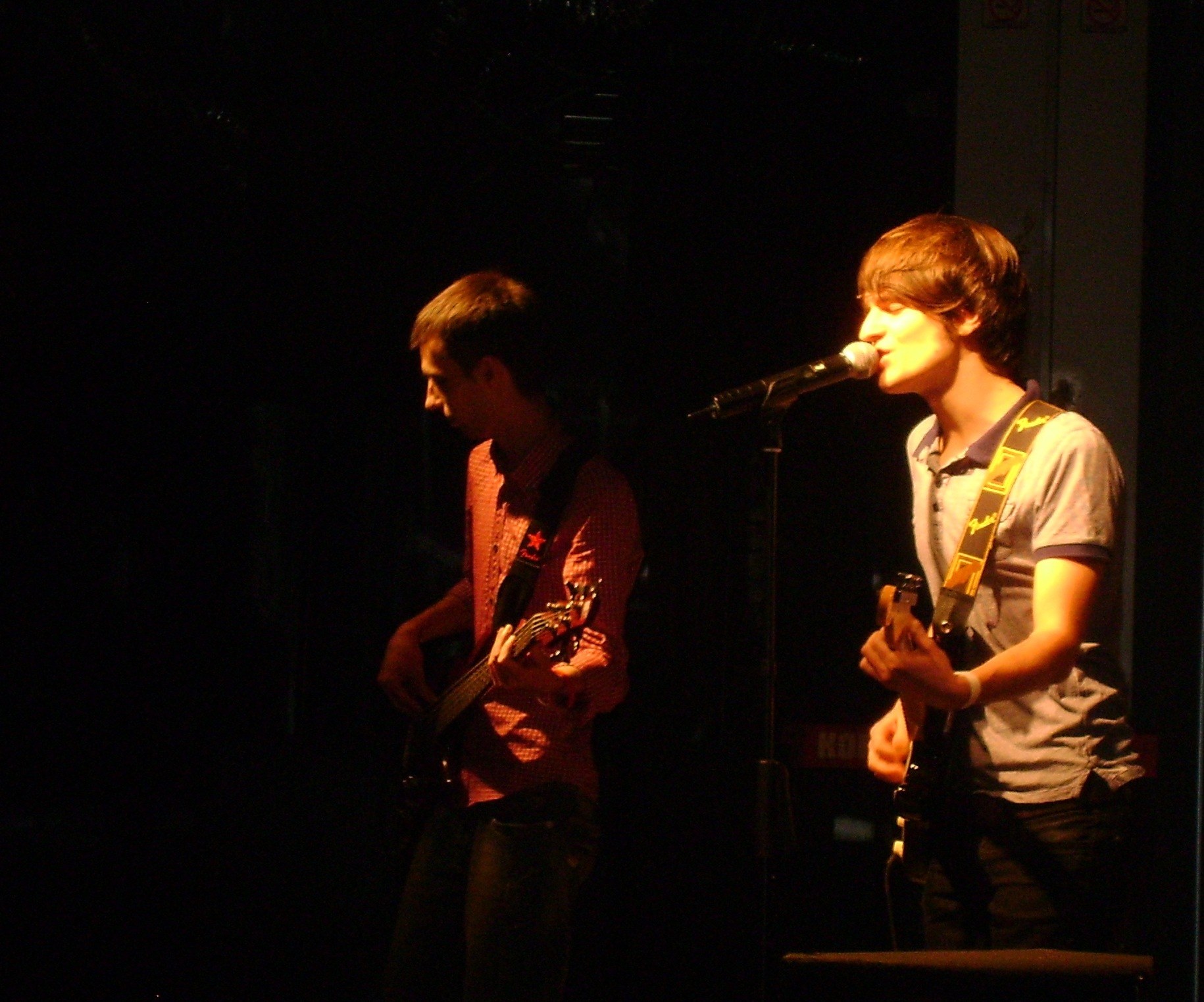 Brunettes Shoot Blondes виступає наблагодійному вечорі на підтримку Артема Гаврищука. Кривий Ріг